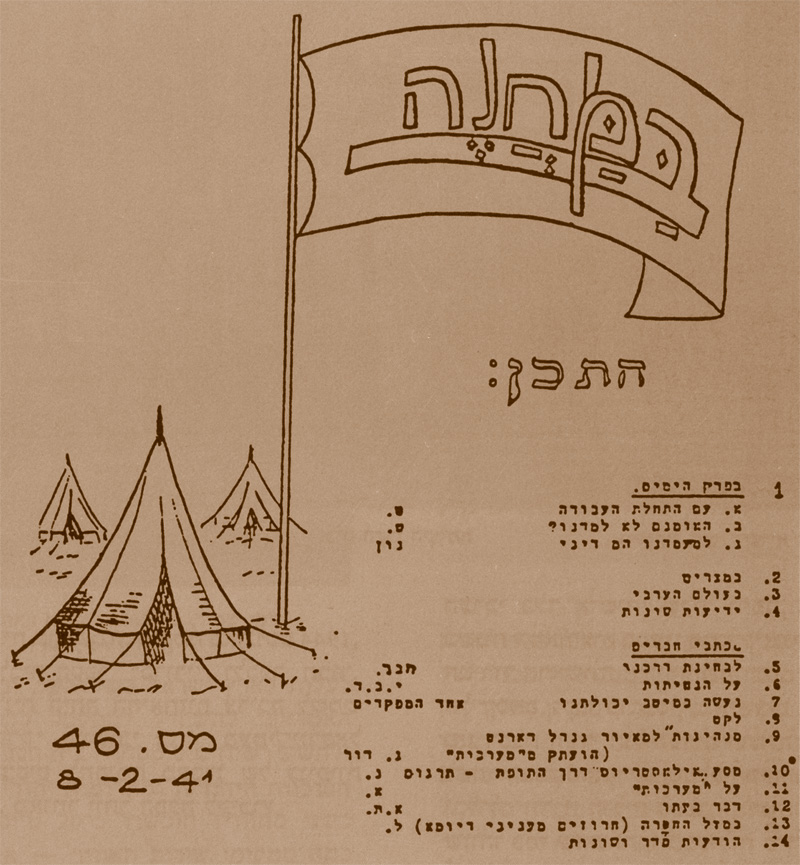 במחנה גליון מחתרתי 1941 ארכיון ההגנה